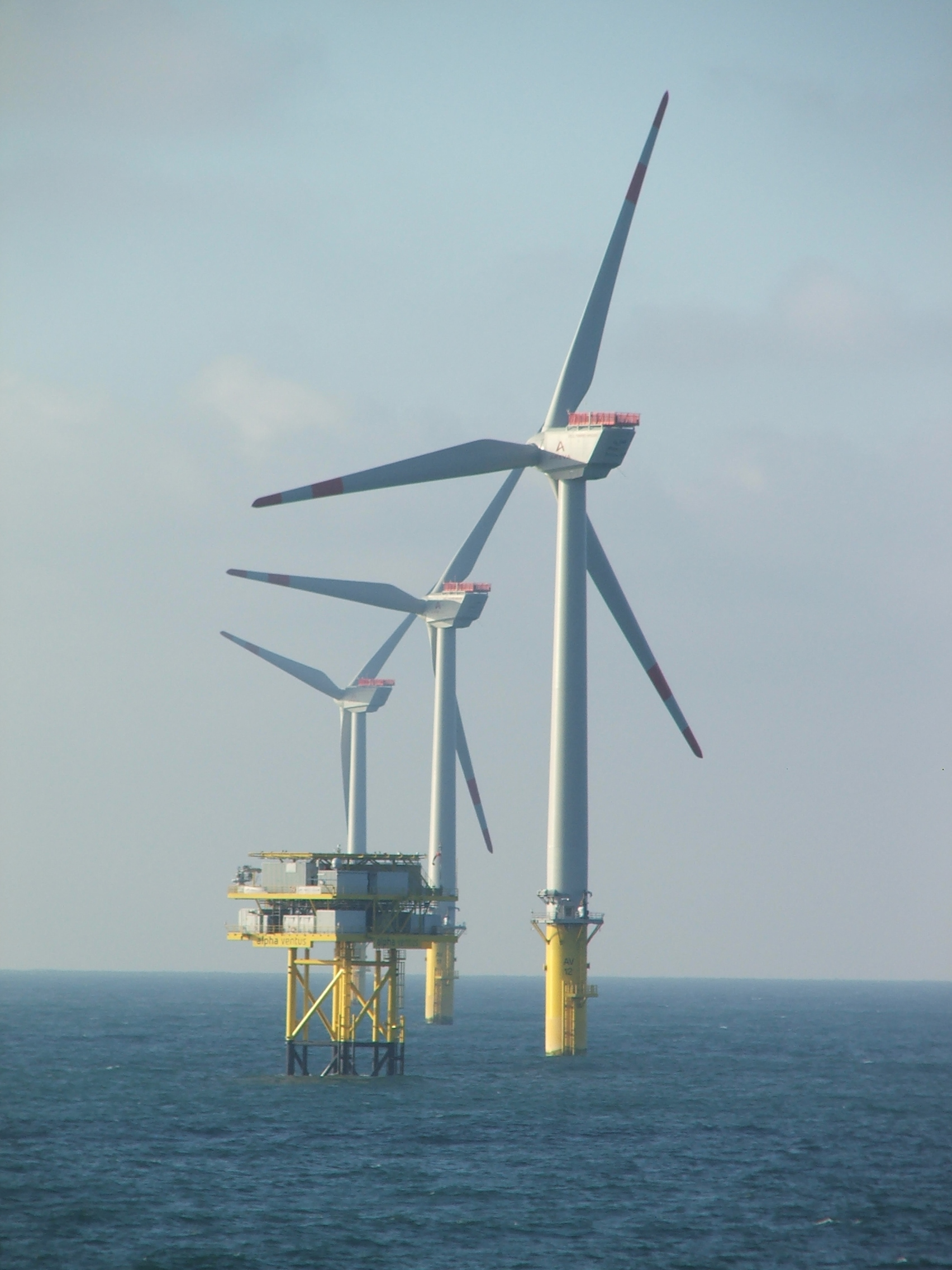 Die drei südlichen Alpha-Ventus-Windmühlen mit der Umspannstation